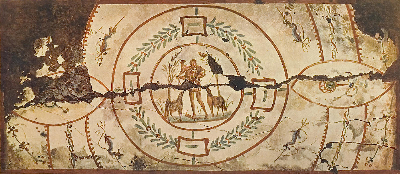 Catacomba di Pretestato. Buon Pastore.